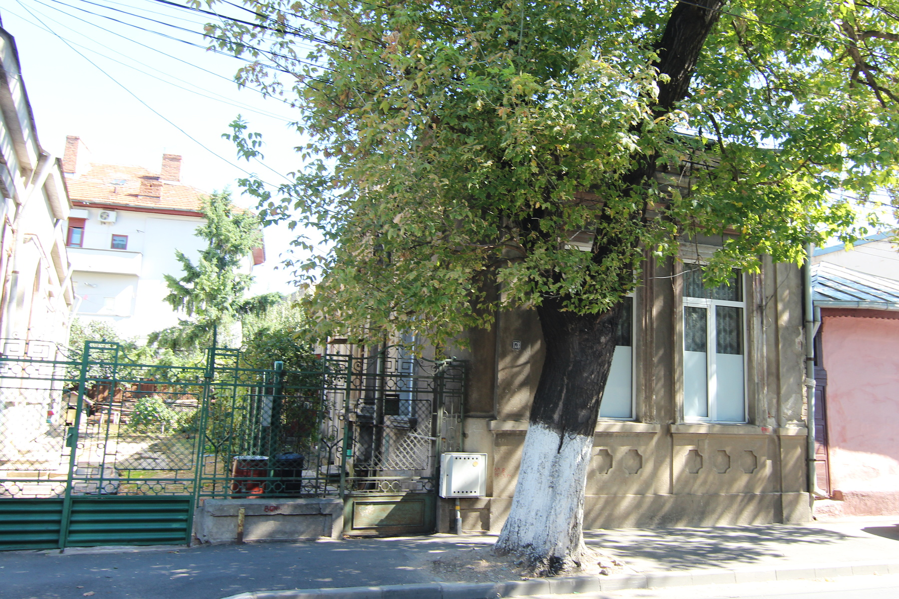 Casă pe strada Traian